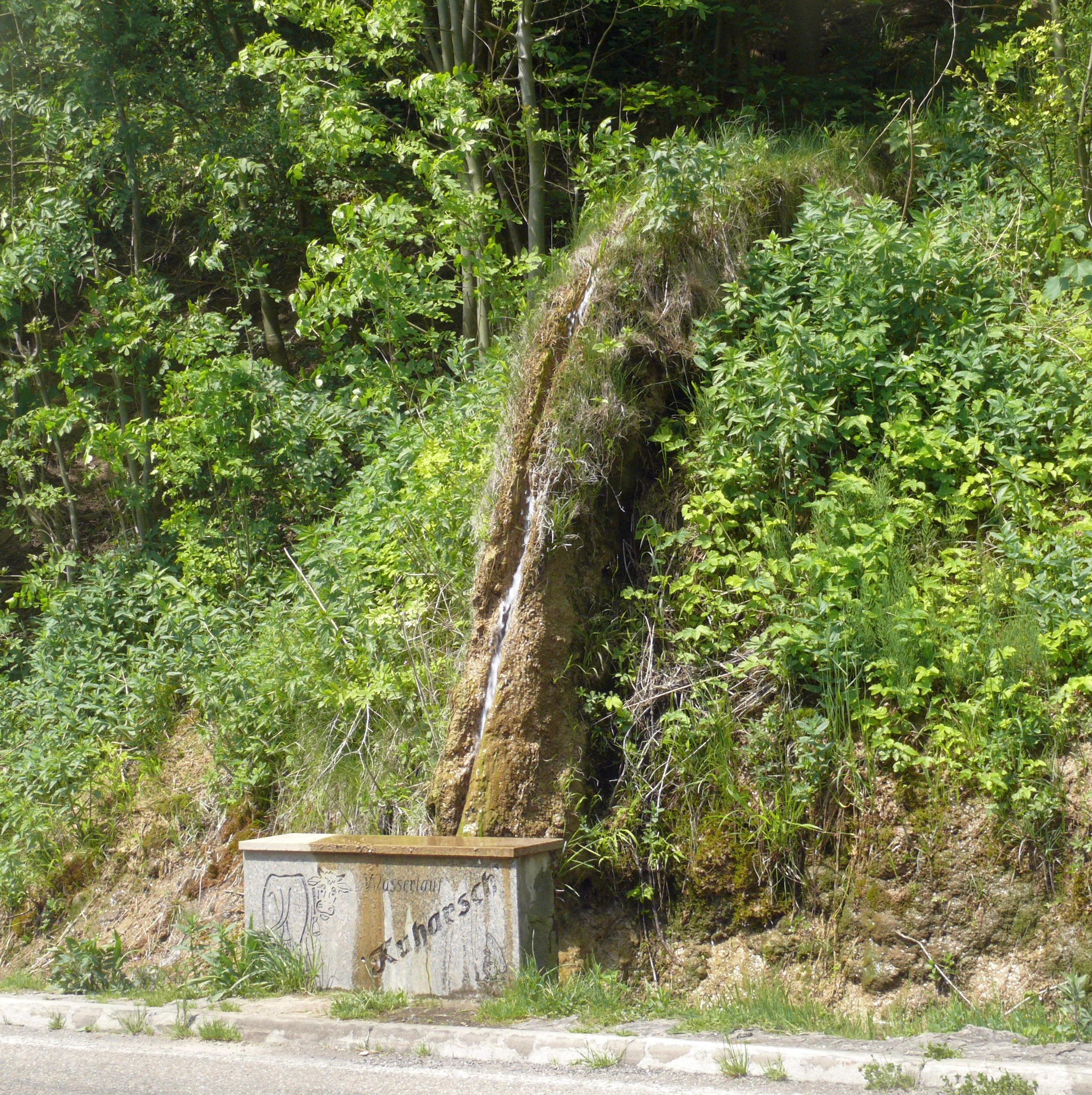 "Kuharsch", Naturdenkmal "Wachsender Bach" (Steinerne Rinne) bei Krautheim an der Jagst.